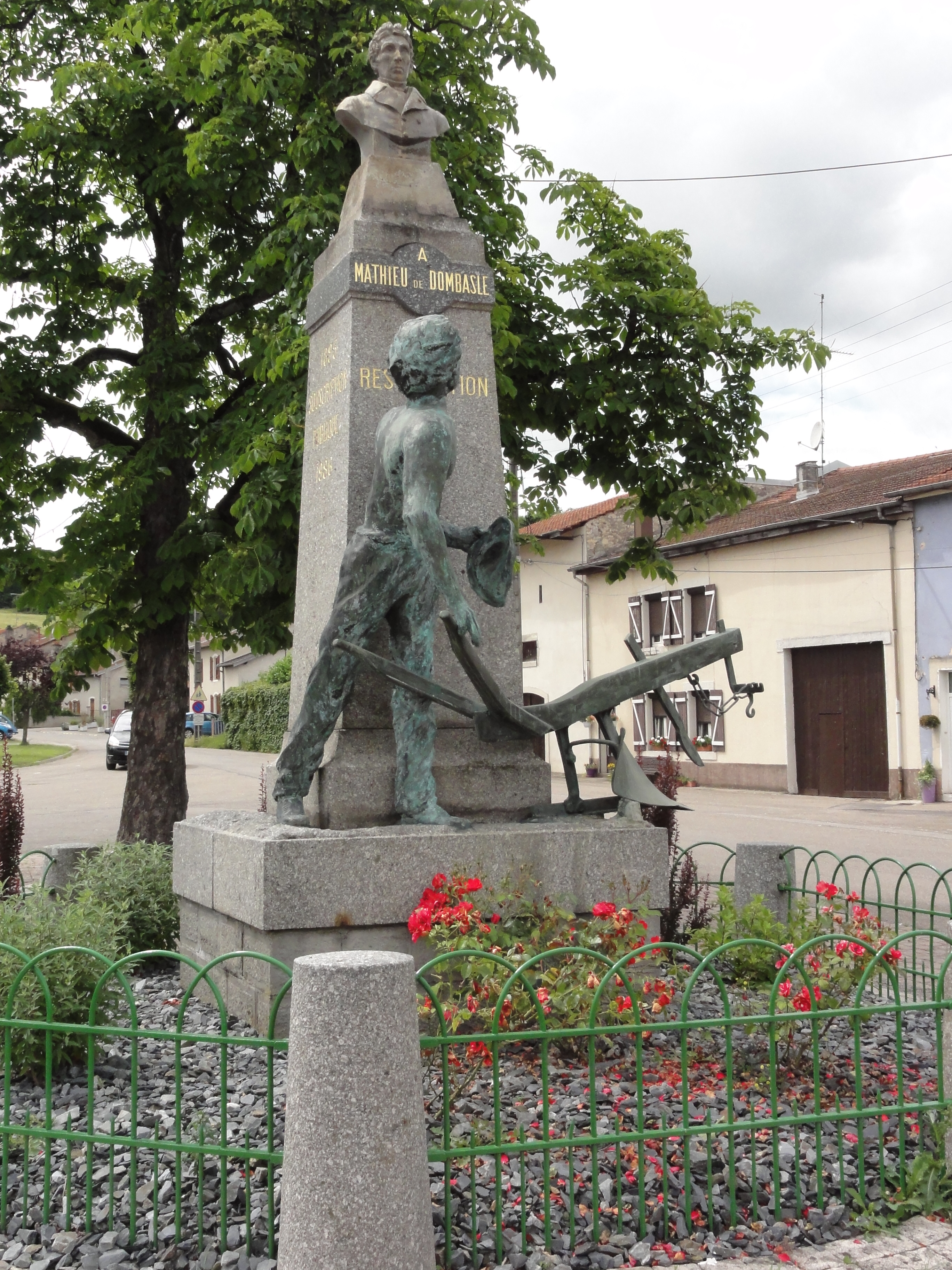 Roville-devant-Bayon (M-et-M) mémorial école d'agriculture